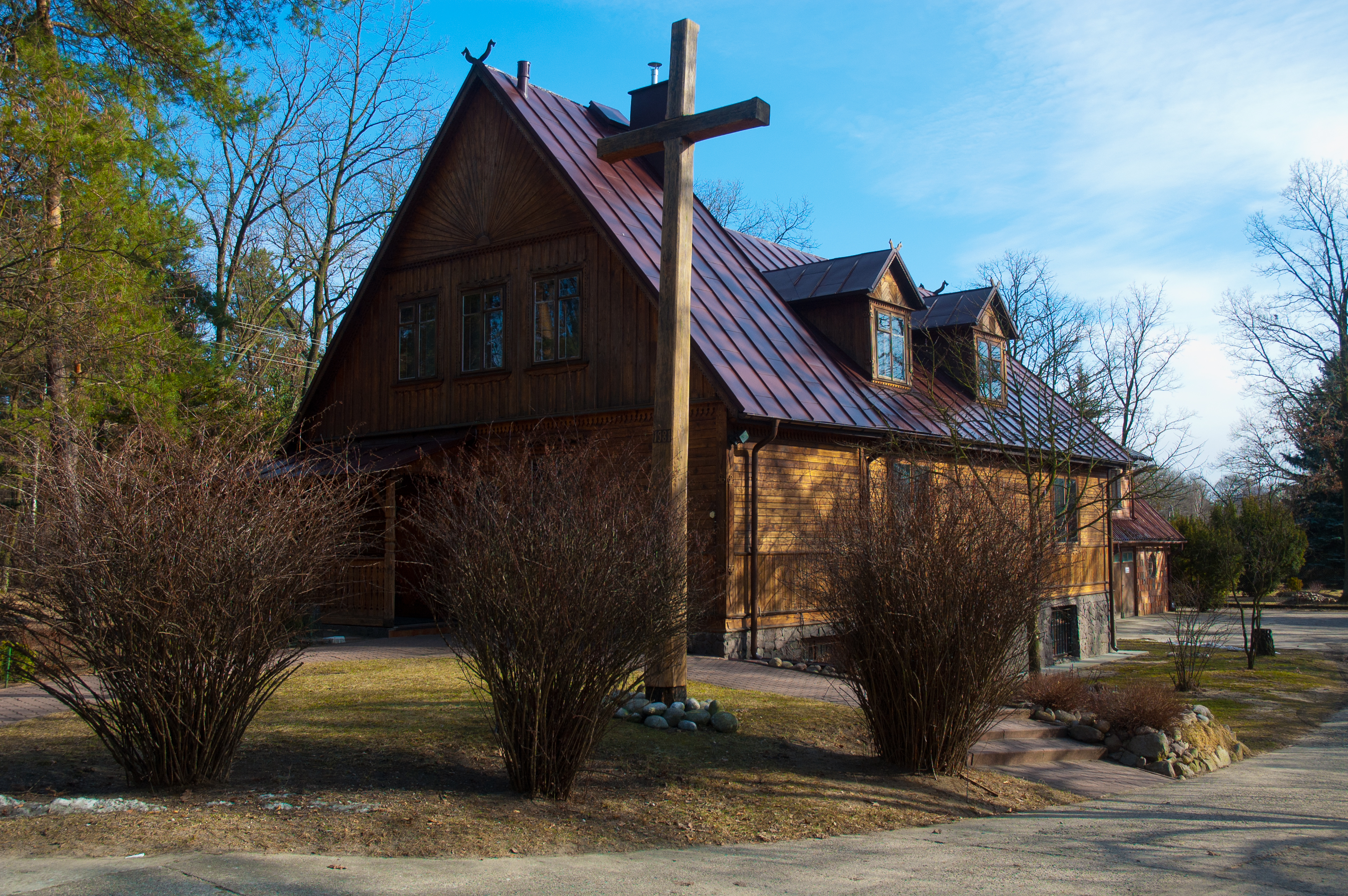 Kaplica prymasowska - Warszawa Choszczówka ul. Świerkowa 4